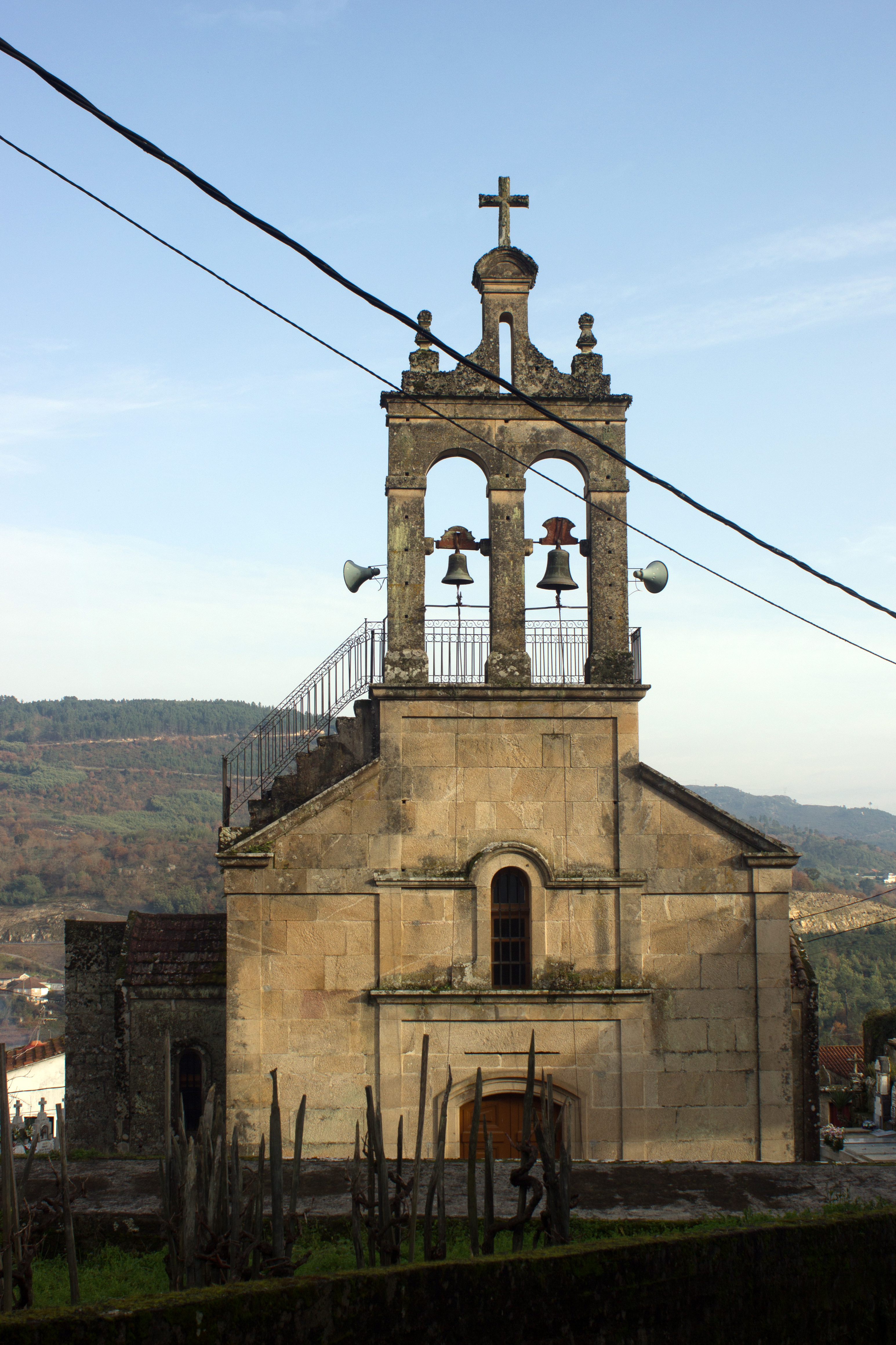 Igrexa de Santiago de Barbantes, no concello de Punxín